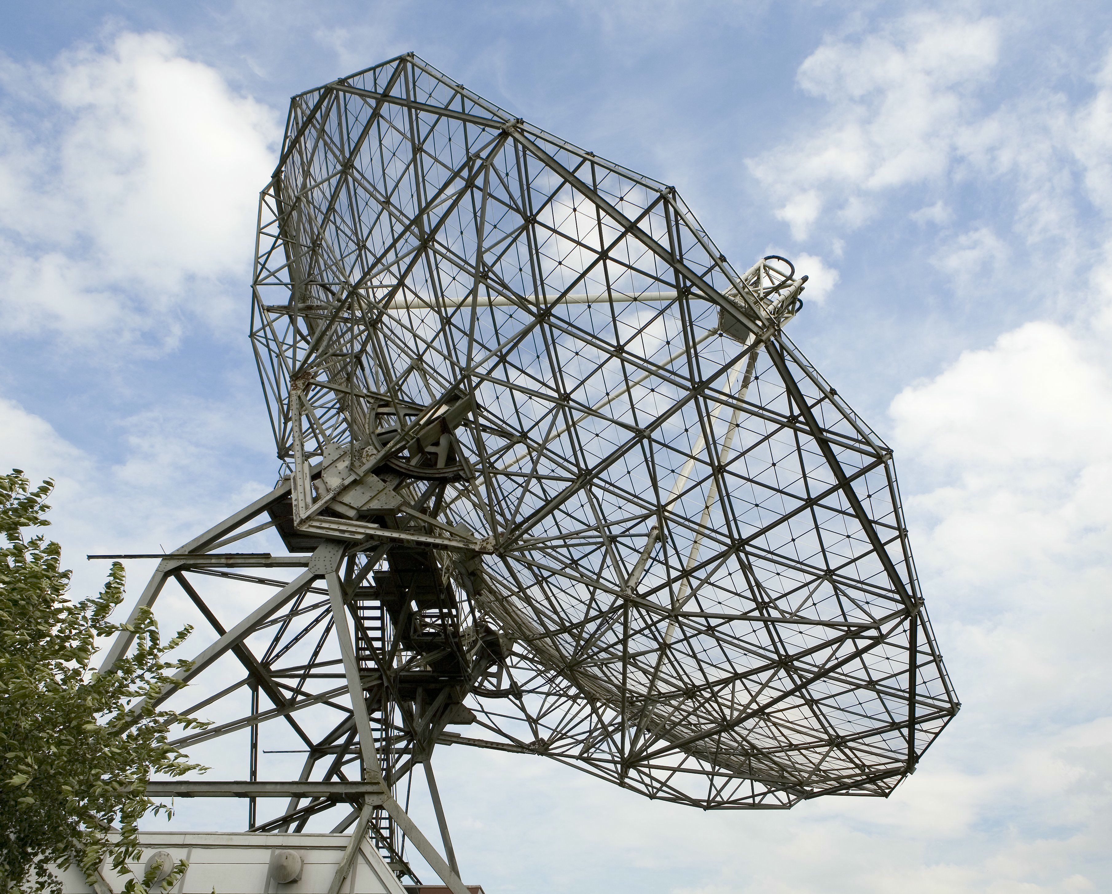 Radiotelescoop Dwingeloo: Overzicht van de Radiotelescoop (opmerking: Gefotografeerd voor Monumenten van Herrezen Nederland)